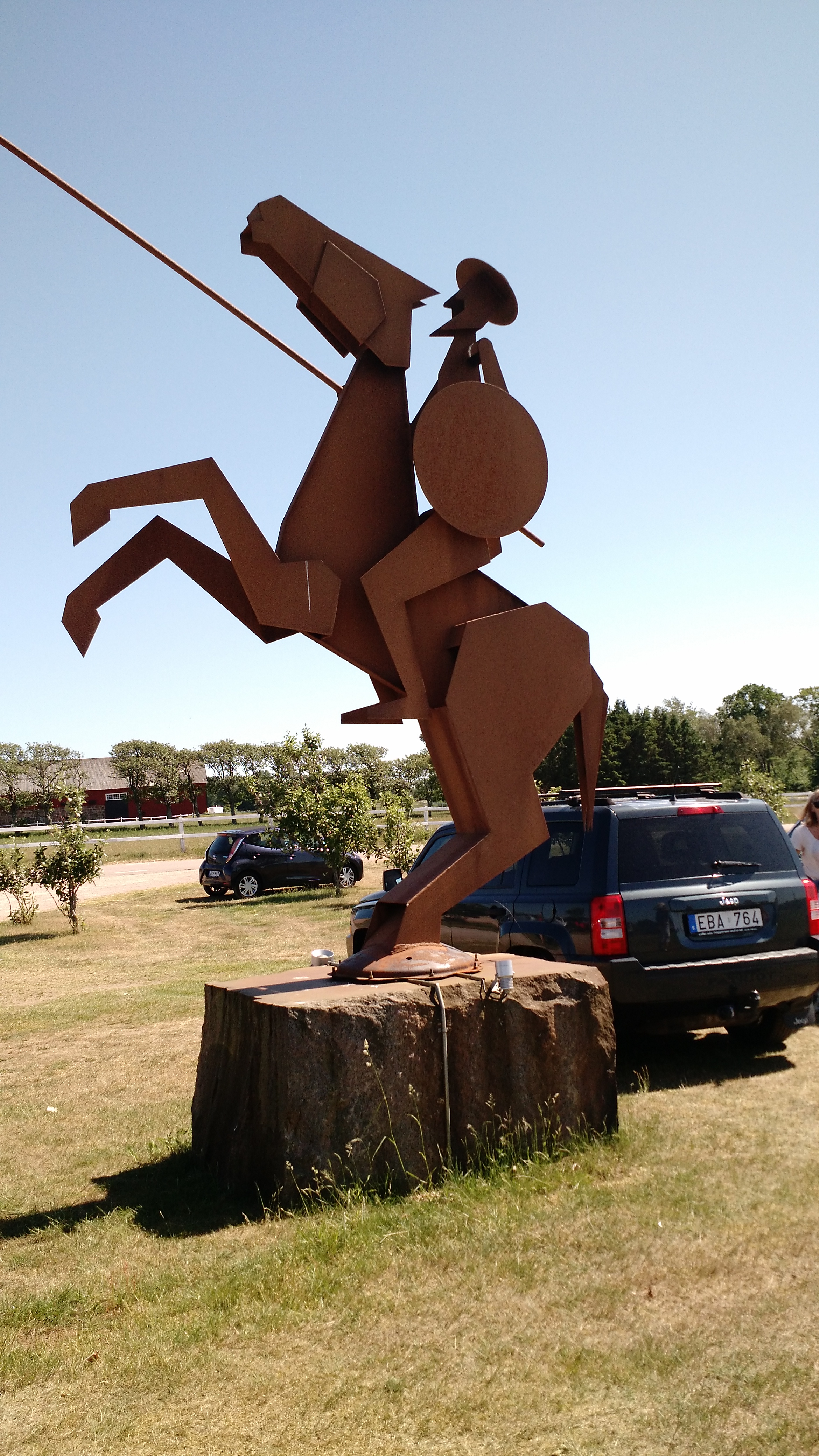 Staty utanför Särdals kvarn. (namn?)